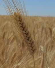 Epis de Tritordeum dans un champ